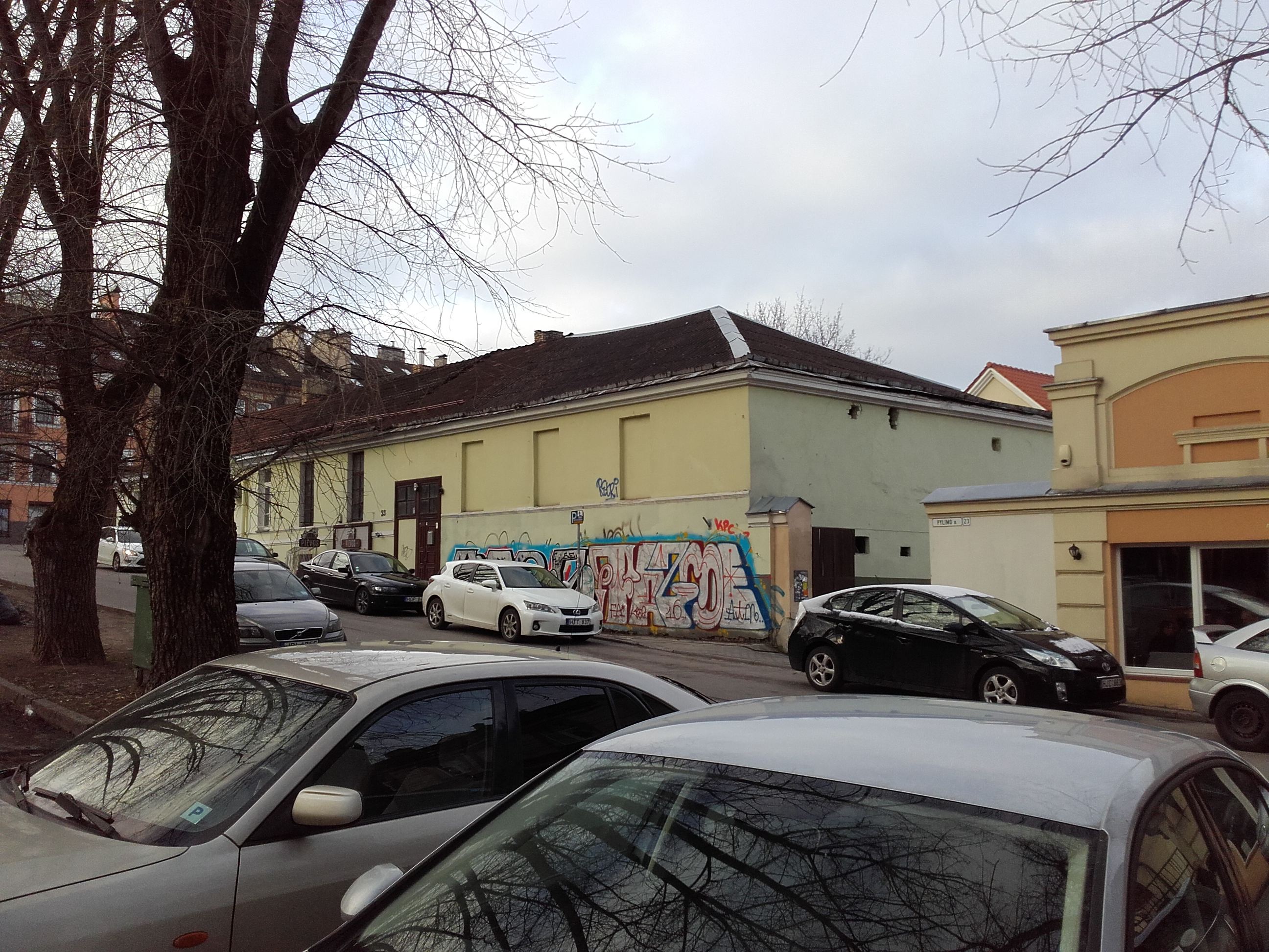 Maskvos pirtis (Vilnius)